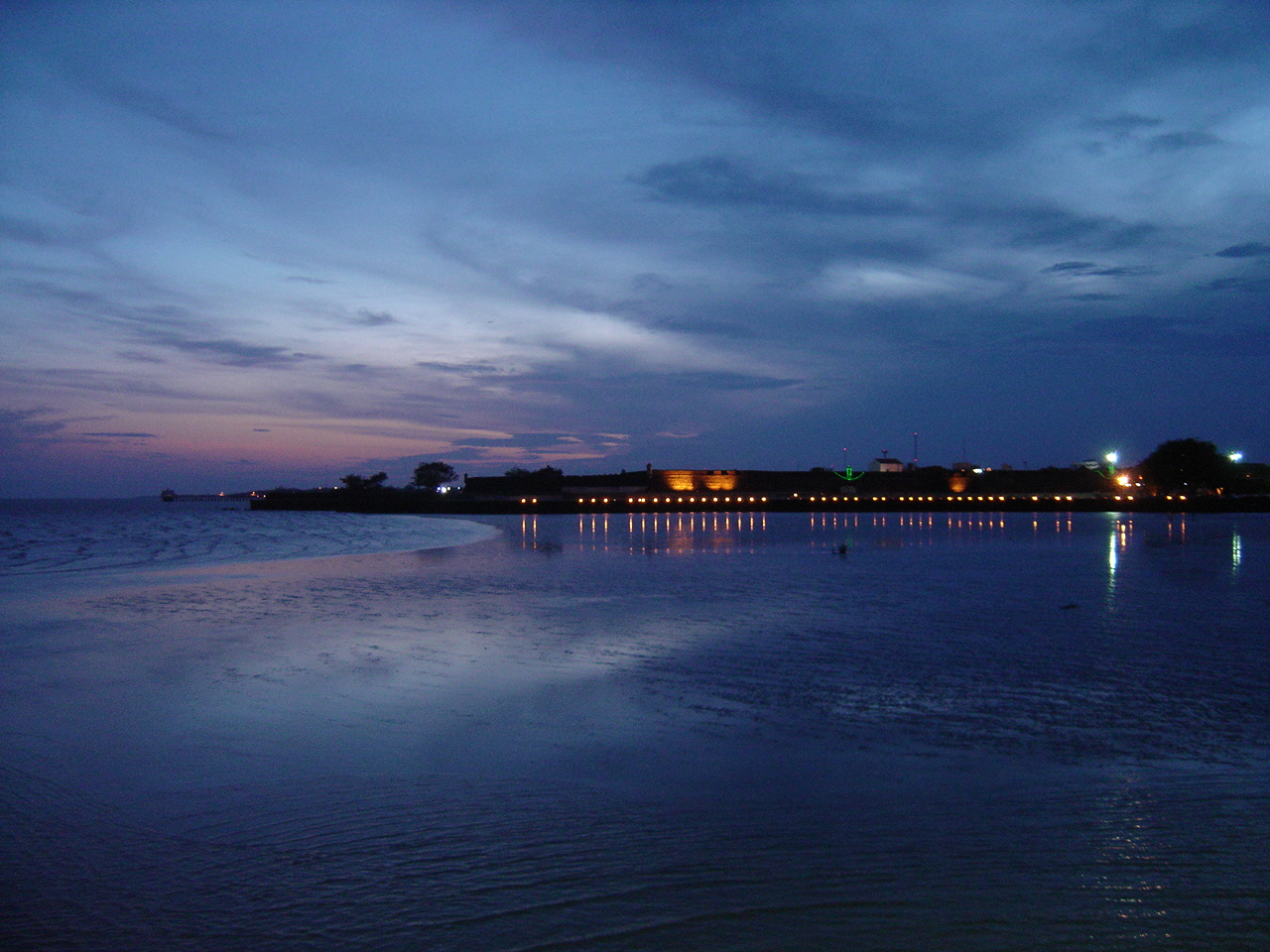 Início de uma noite de verão, Trapiche Eliezer Levy - Macapá, Amapá - Brasil